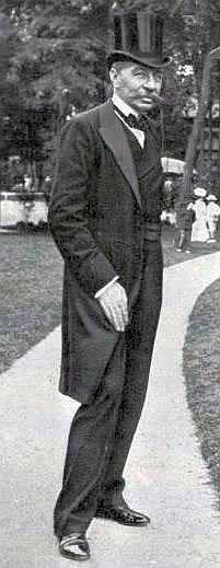 Le vicomte Léon de Janzé, Président de l'U.S.F.S.A. à la fin des années 1890, et Président du Cercle de Tennis de l'Ile de Puteau (ici en 1905).